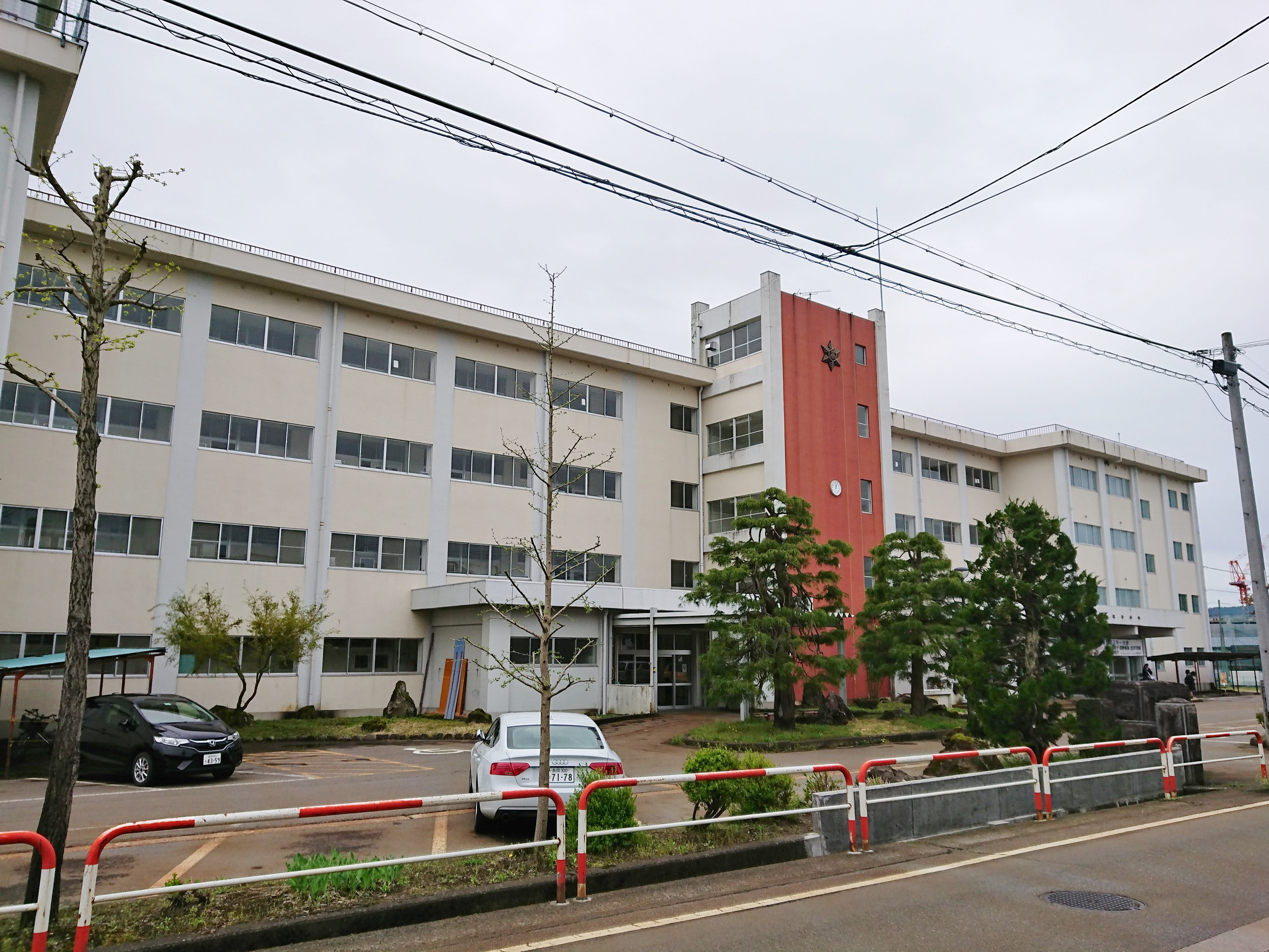 新潟県立十日町高等学校の校舎外観